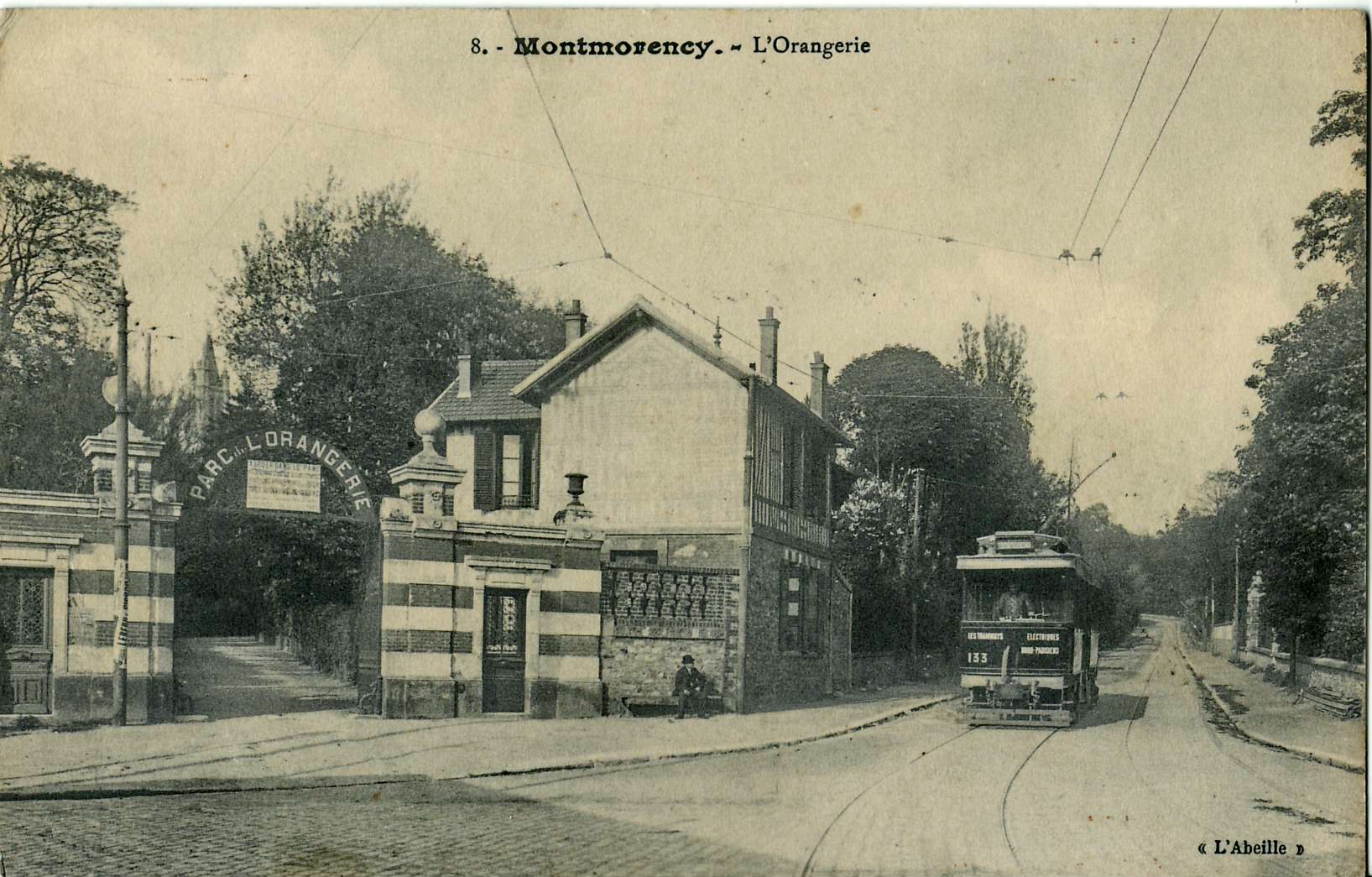 Carte postale ancienne éditée par Abeille, N°8 / MONTMORENCY - L'Orangerie.Vue d'une rame du tramway Enghien - Montmorency, alors exploité par la Compagnie des tramways électriques du Nord-Parisien